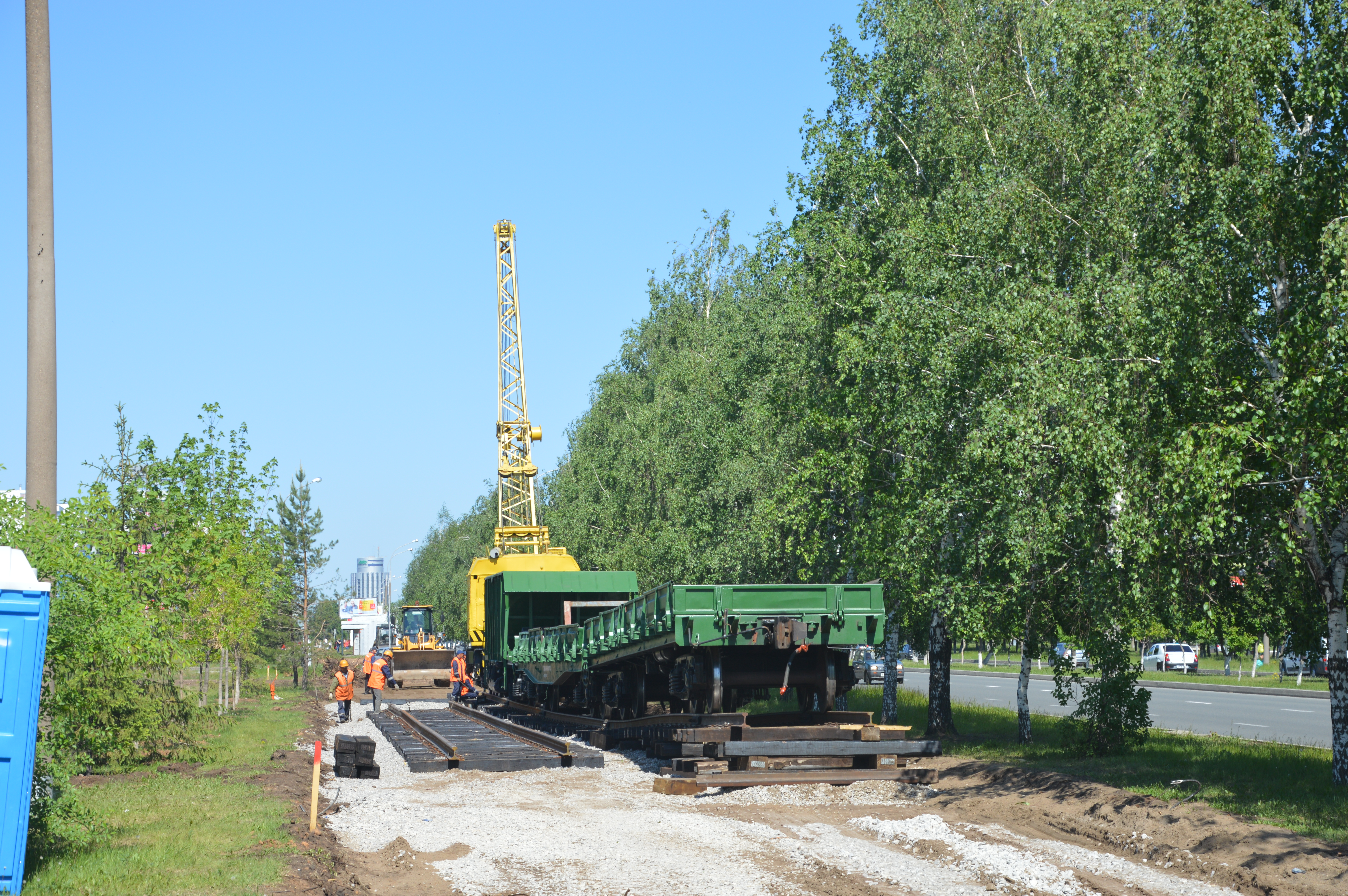 Строительство новой 6-ти километровой трамвайной линии в Набережных Челнах